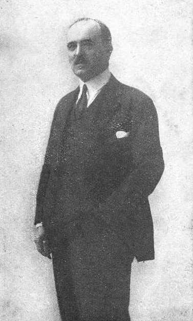 Rafael Romero Filgueira, fotografía en Vida Gallega 1926